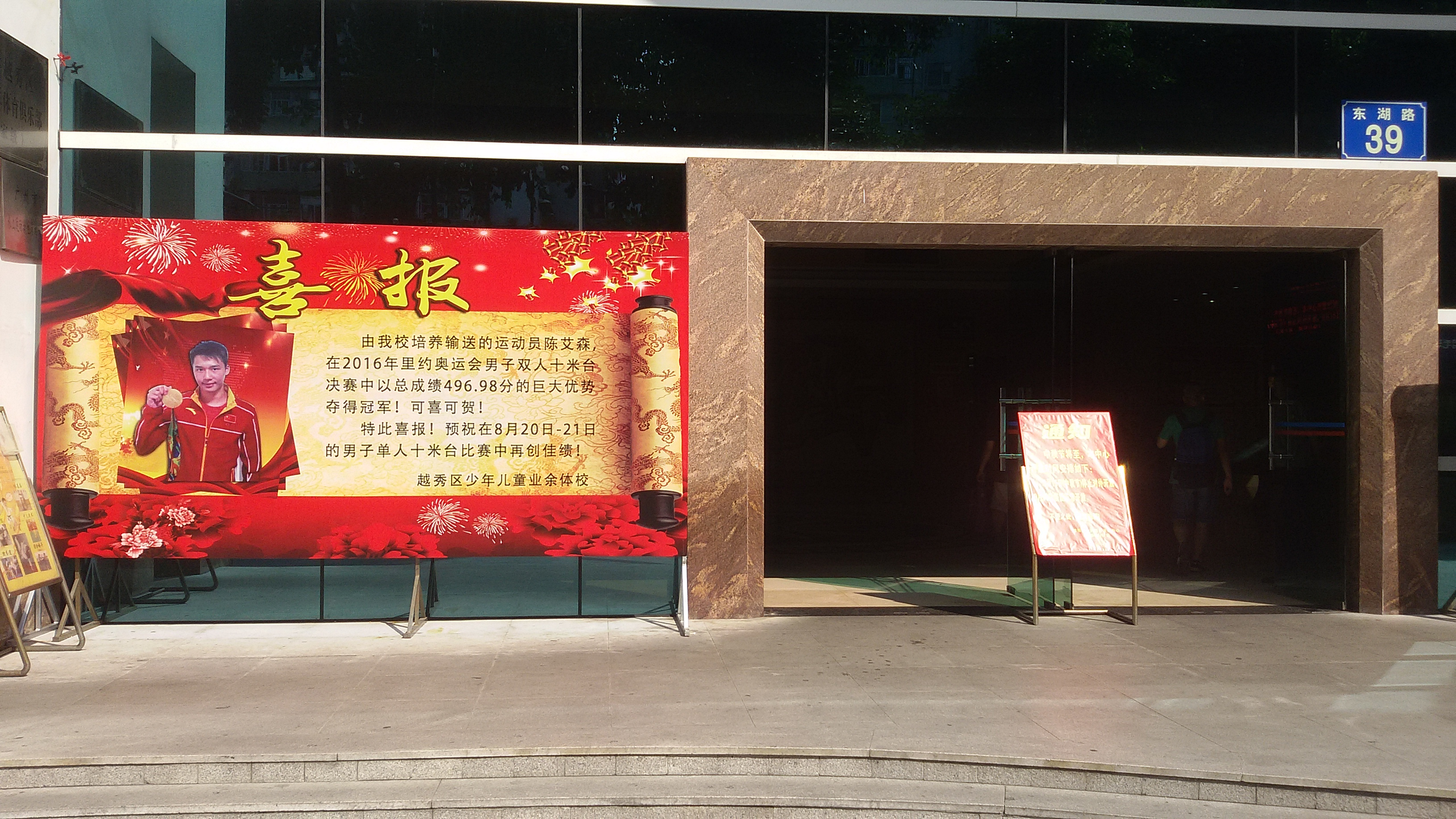 粵語: 2016年8、9月，陳艾森俾越秀區全民健身活動中心門口邊嘅公告欄登咗佢攞咗2016年奧運跳水冠軍嘅消息。